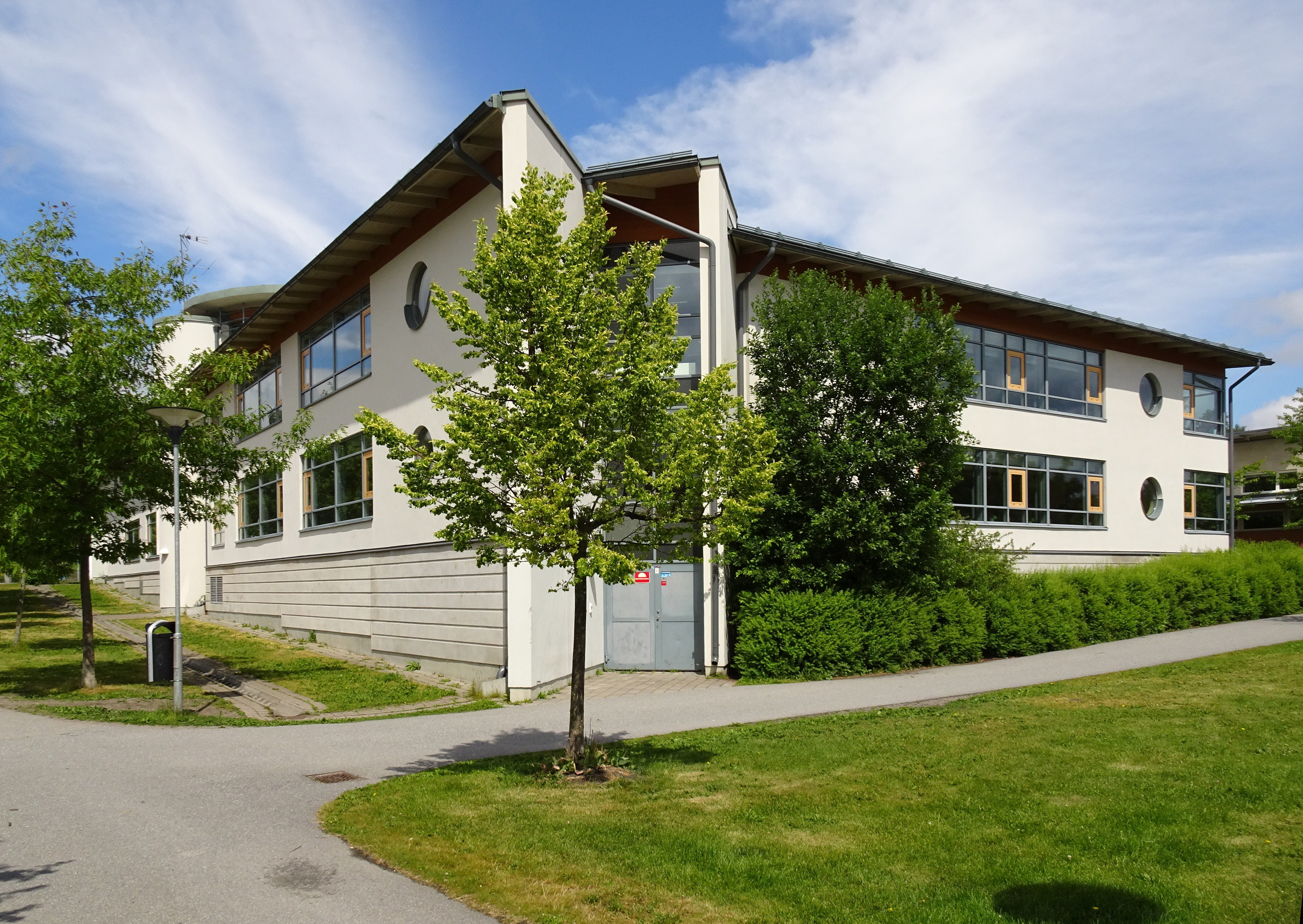 Vistaskolan i Vistaberg (nya delen)